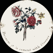 Taumatropio fiori e vaso, 1825 Frame 1.png